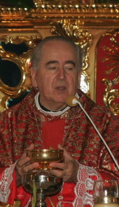 abp Stanisław Ryłko podczas Mszy św. w Ludźmierzu